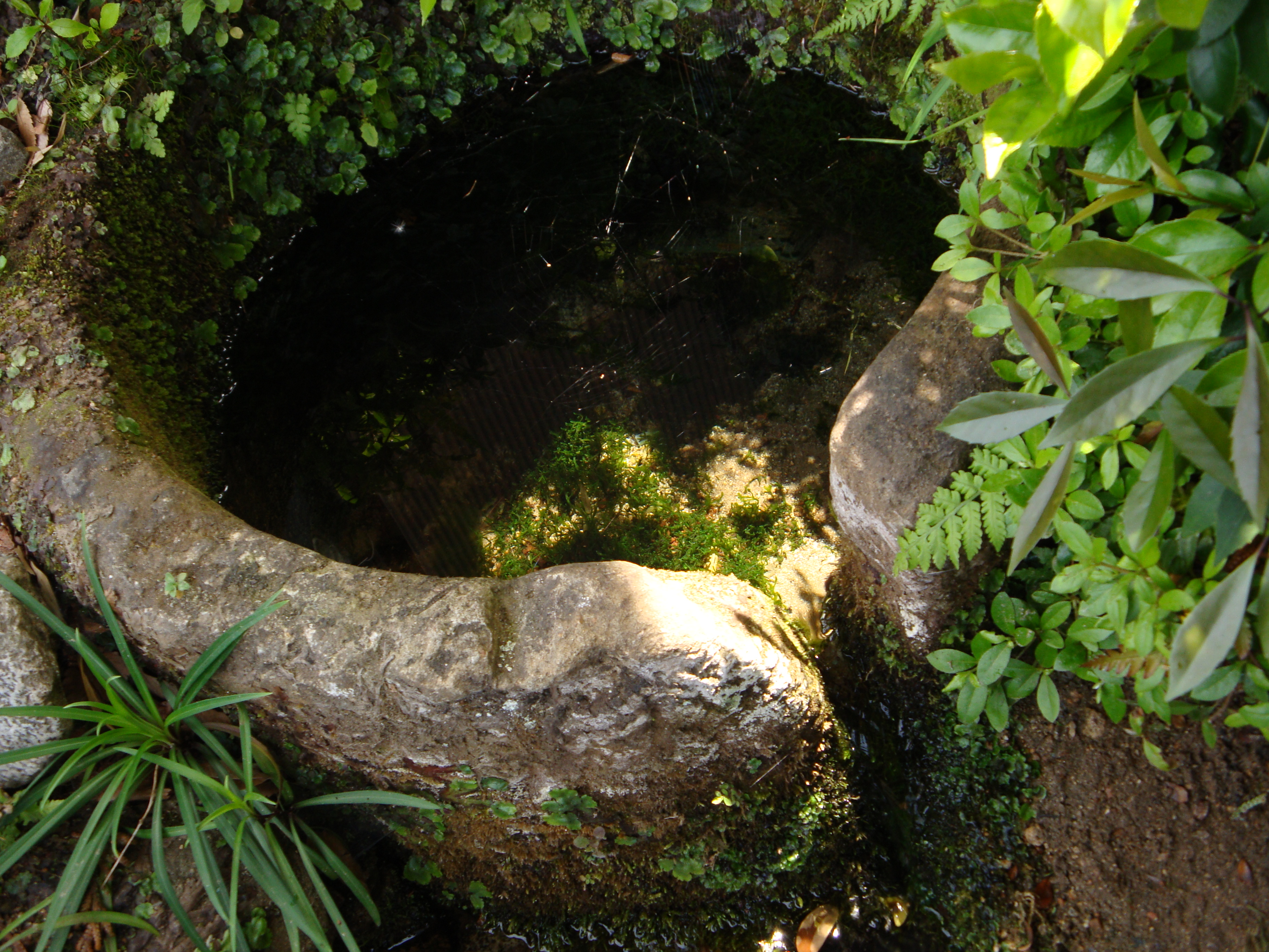 押しの泉（石川県宝達志水町）